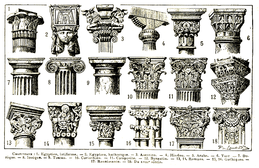 Chapiteaux en architecture Source scannée depuis le Larousse 1922 par Nataraja-Shiva